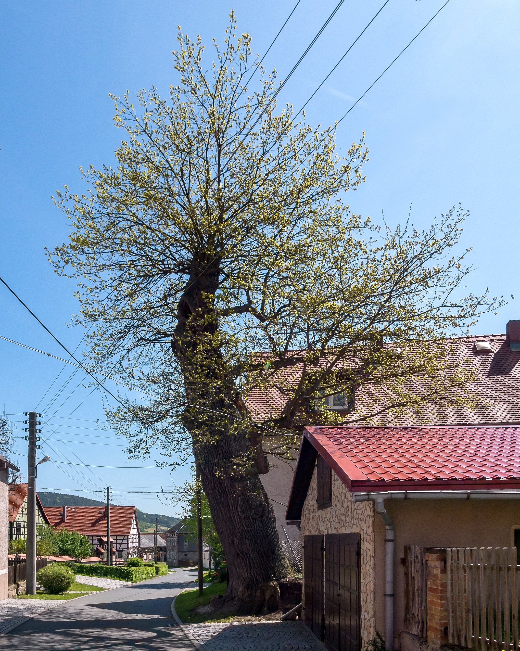 Streipert-Eiche Listen Nr. 7 Engerda III